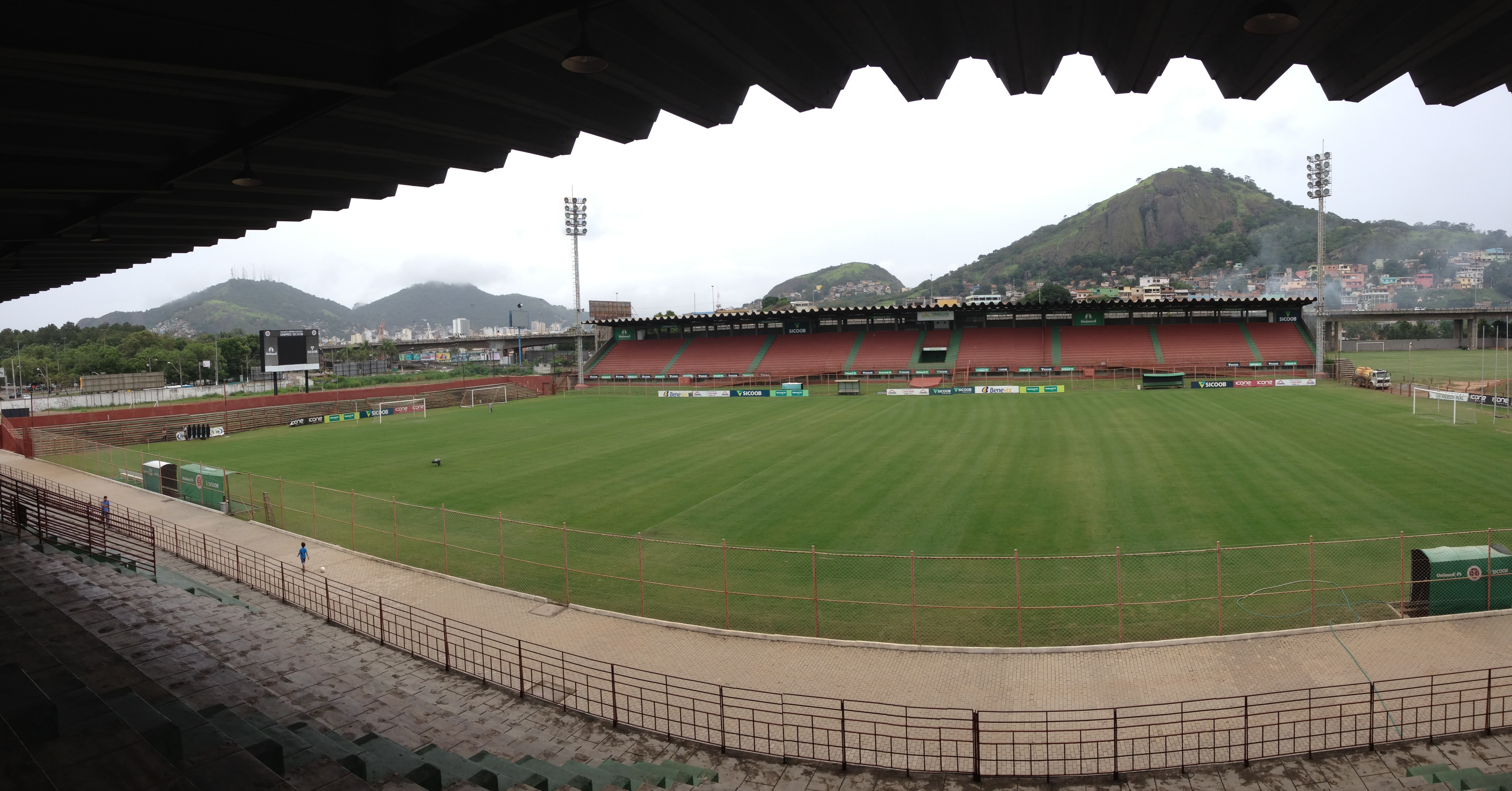 Estádio Engenheiro Alencar de Araripe em janeiro de 2016.